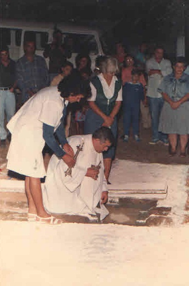 Benção e Santa Missa pelo Padre Romero e auxiliado pela Ministra da Eucaristia Dulce Braz Costa e a Tesoureira da Comissão de Construção Floria Franz Schutte